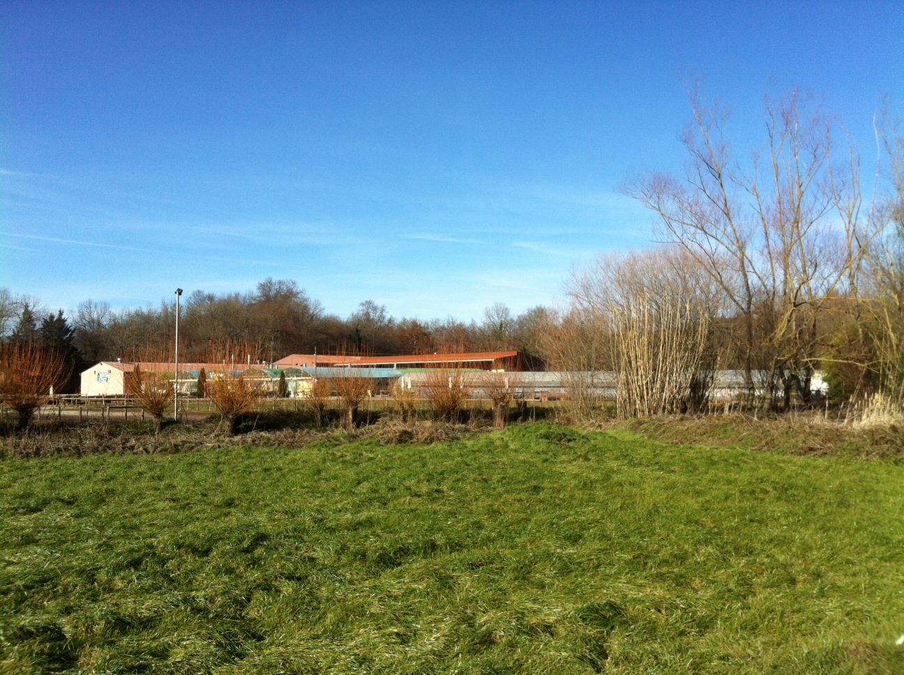 Visió general de la granja la Fageda